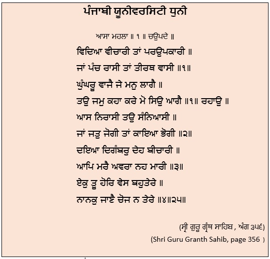 ਪੰਜਾਬੀ: ਪੰਜਾਬੀ ਯੂਨੀਵਰਸਿਟੀ ਧੁਨੀ (ਗੀਤ), ਸ੍ਰੀ ਗੁਰੂ ਗਰੰਥ ਸਾਹਿਬ ਤੋਂ ਲਿਆ ਗਿਆ